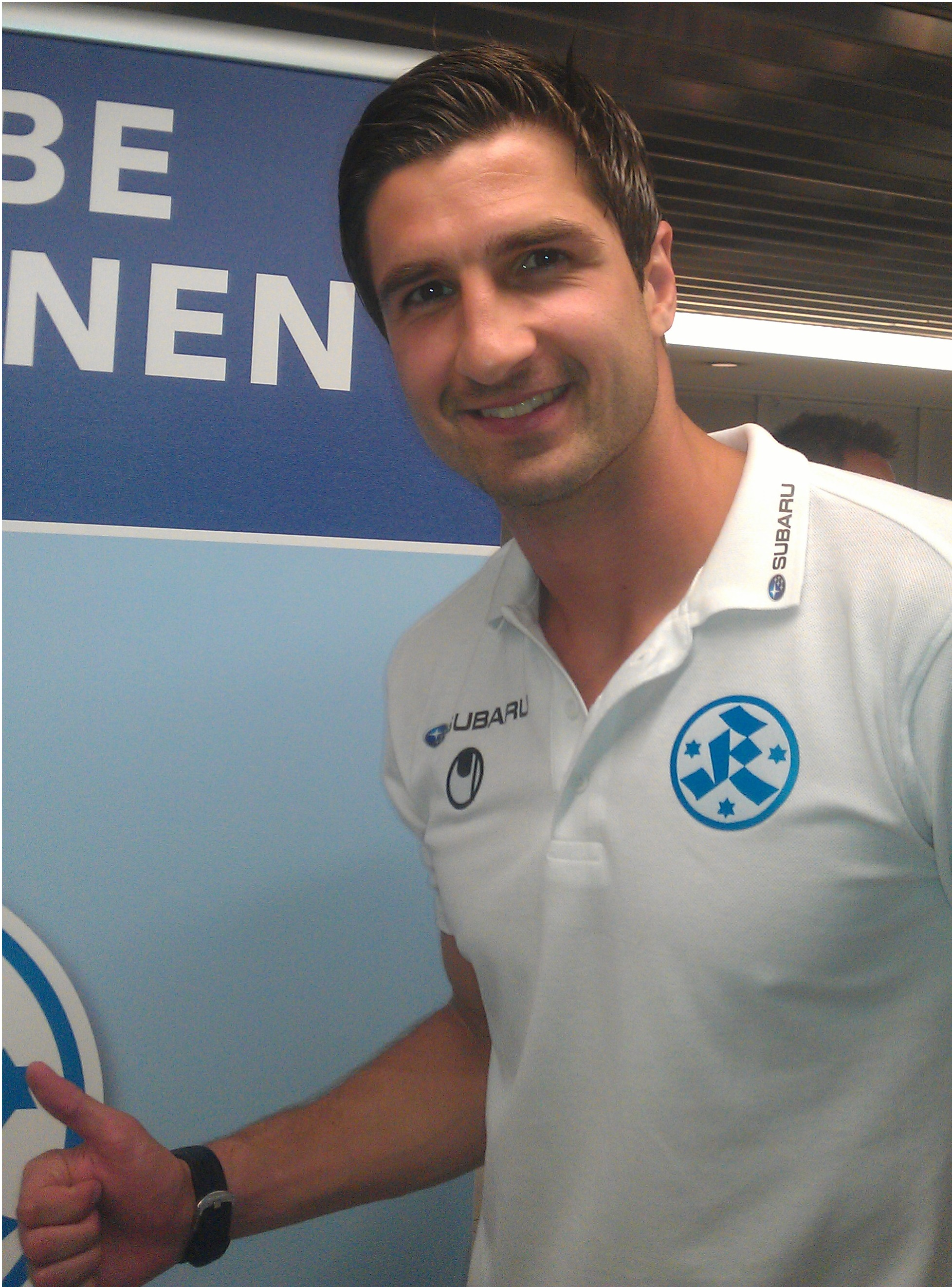 Stefan Maletić